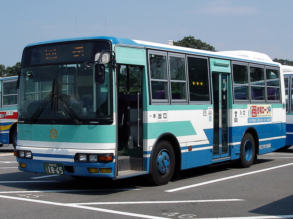 事業者: 松江市交通局 陸運登録: 島根22き18-65 シャーシ: 三菱ふそう KC-MK219F 車体: MBM 年式: 1997年 撮影場所: 平成町車庫（許可済み）